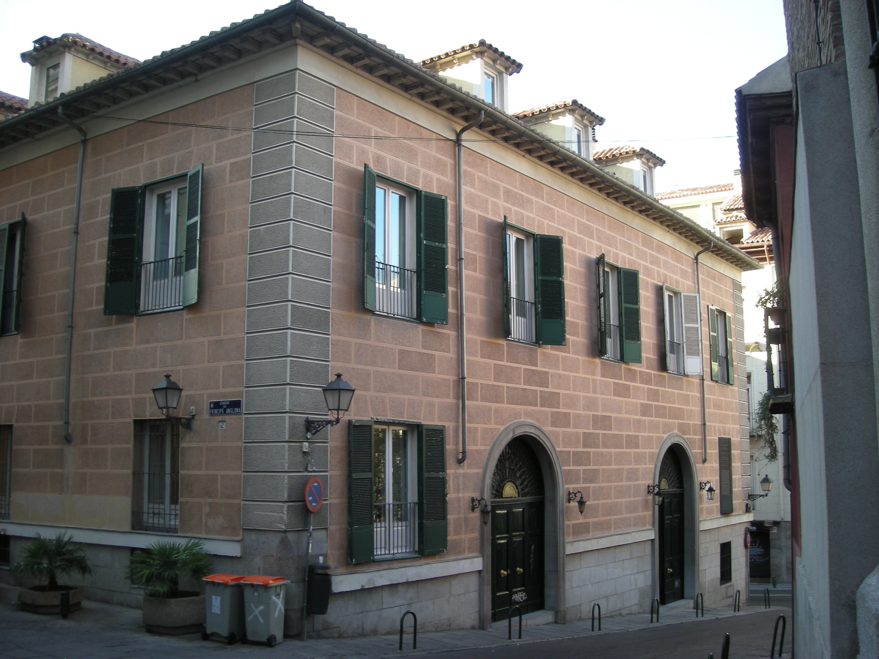 Palacio del Príncipe de Anglona; Madrid, España.